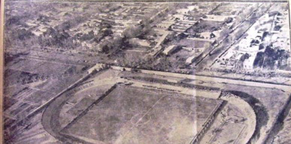 Estadio Bautista Gargantini en 1934.